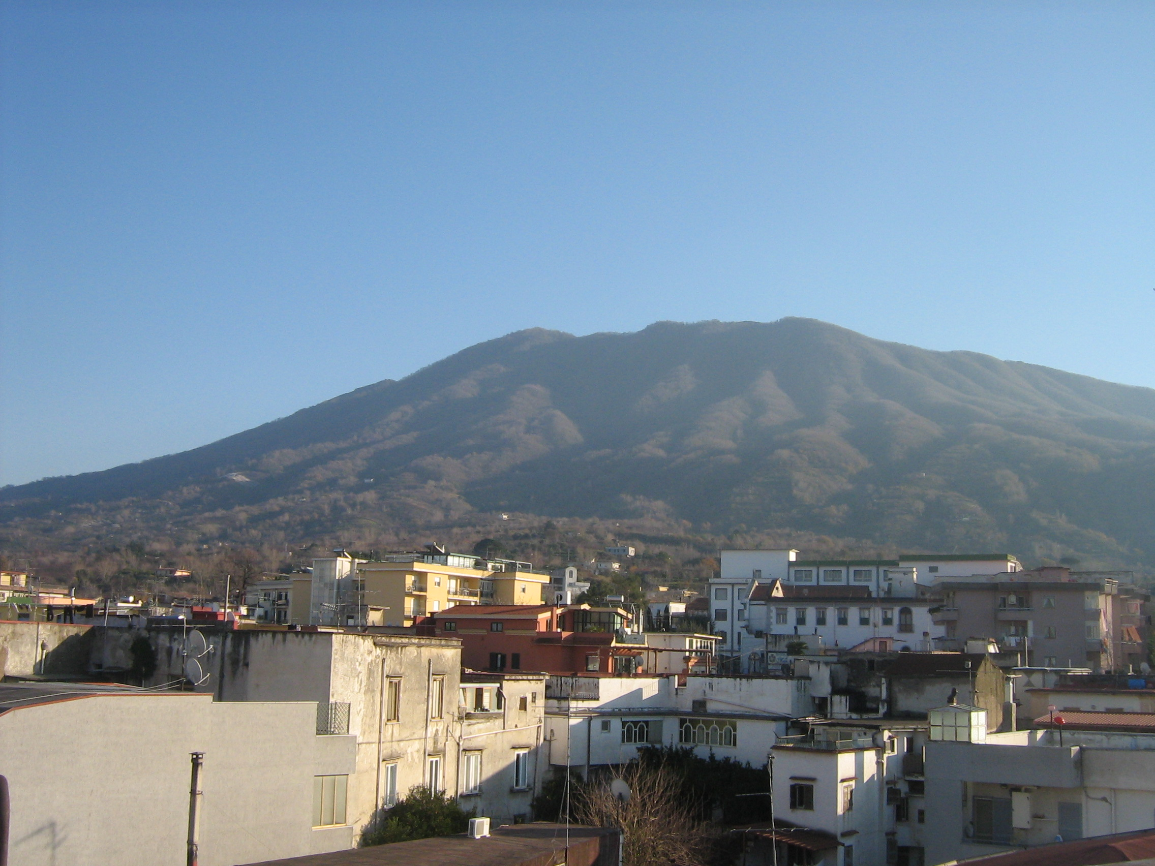 Monte Somma da Sant'Anastasia